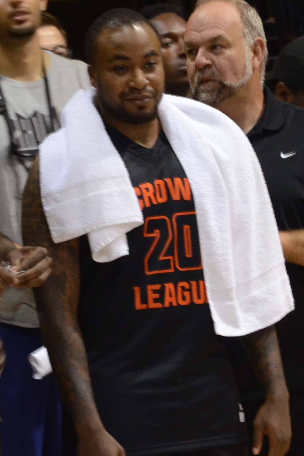 Junior Cadougan